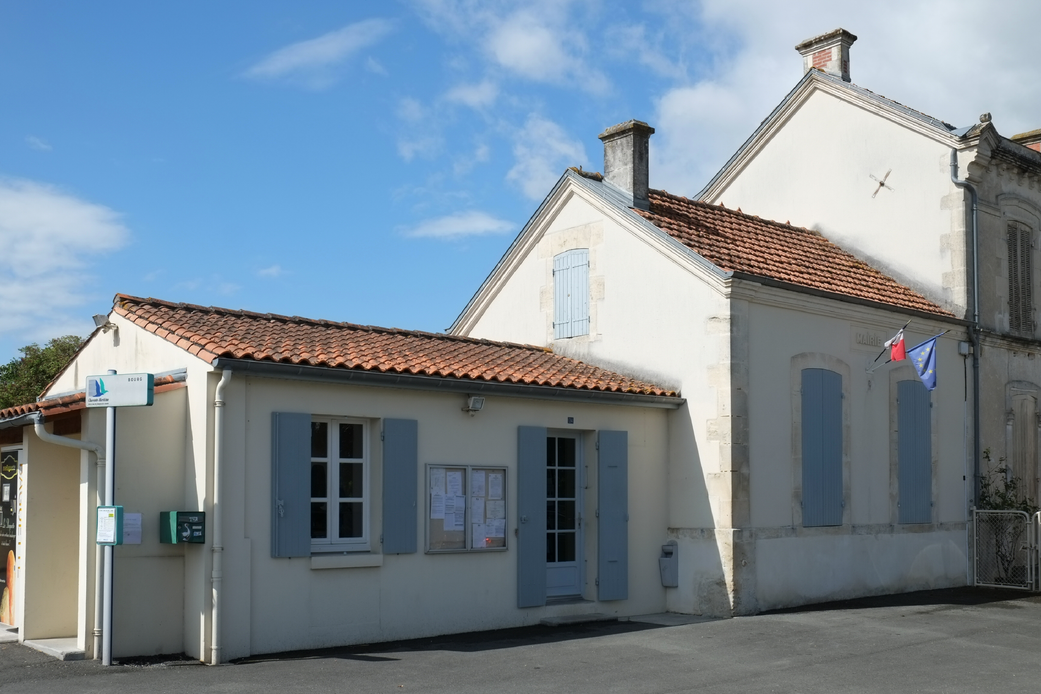 Mairie Blanzac-lès-Matha Charente-Maritime France